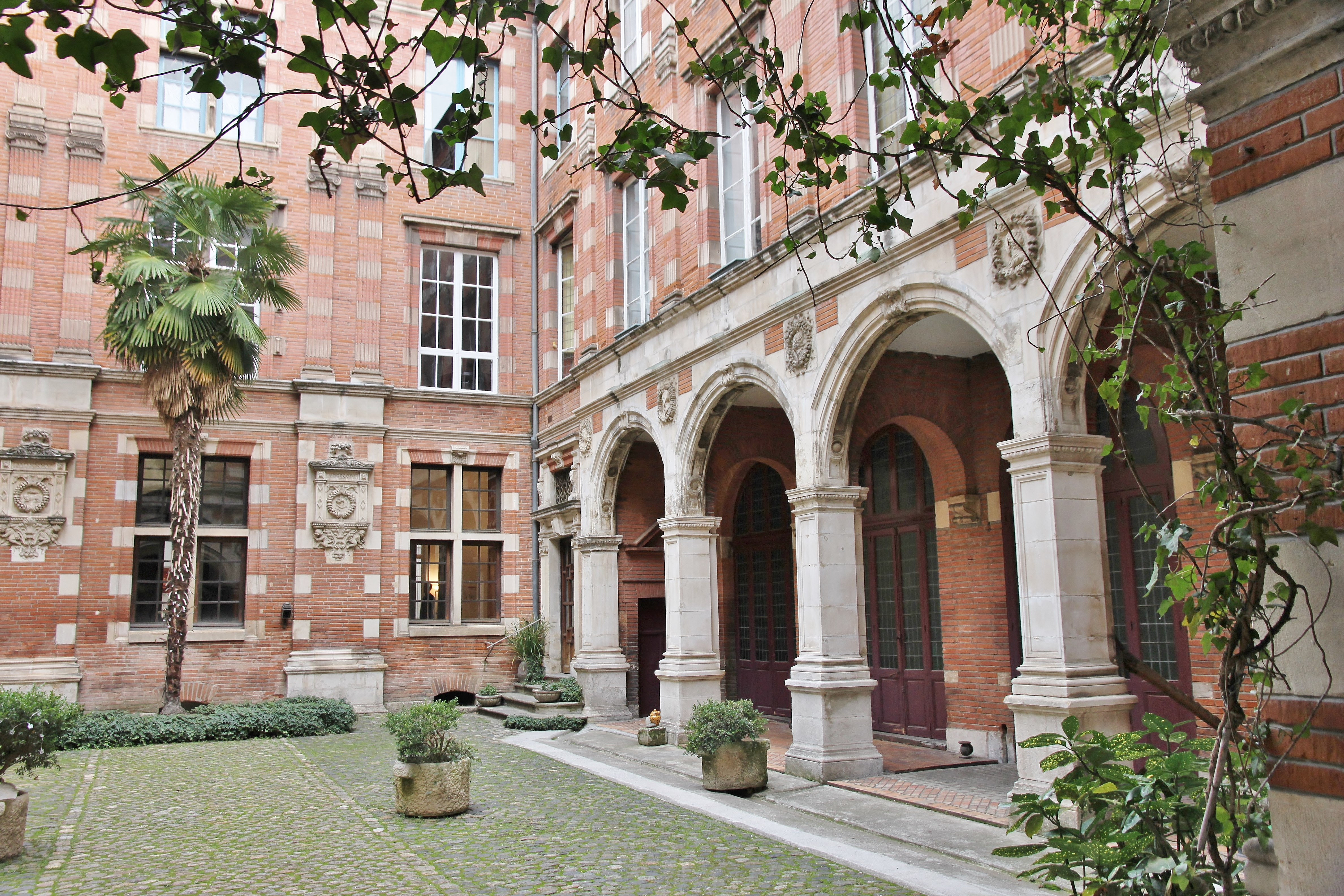 Galerie Renaissance dans la cour de l'hôtel de Montval